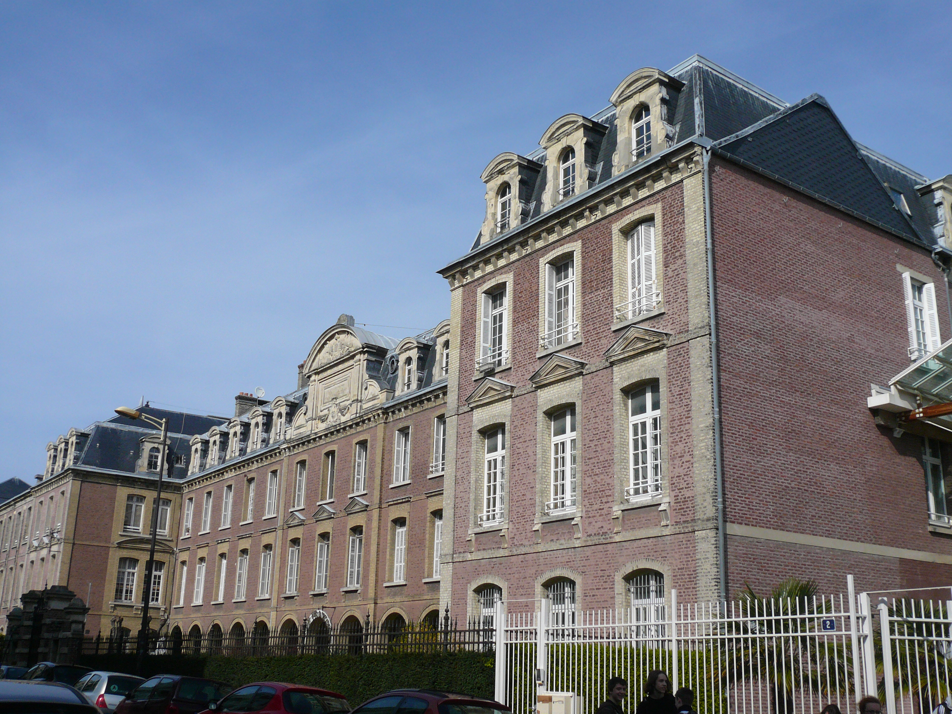 Facade - Rue Jean-Paul Sartre